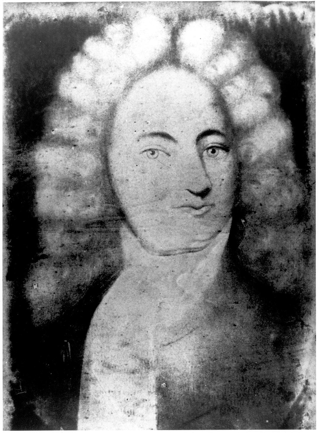 колониальный губернатор Южной Каролины